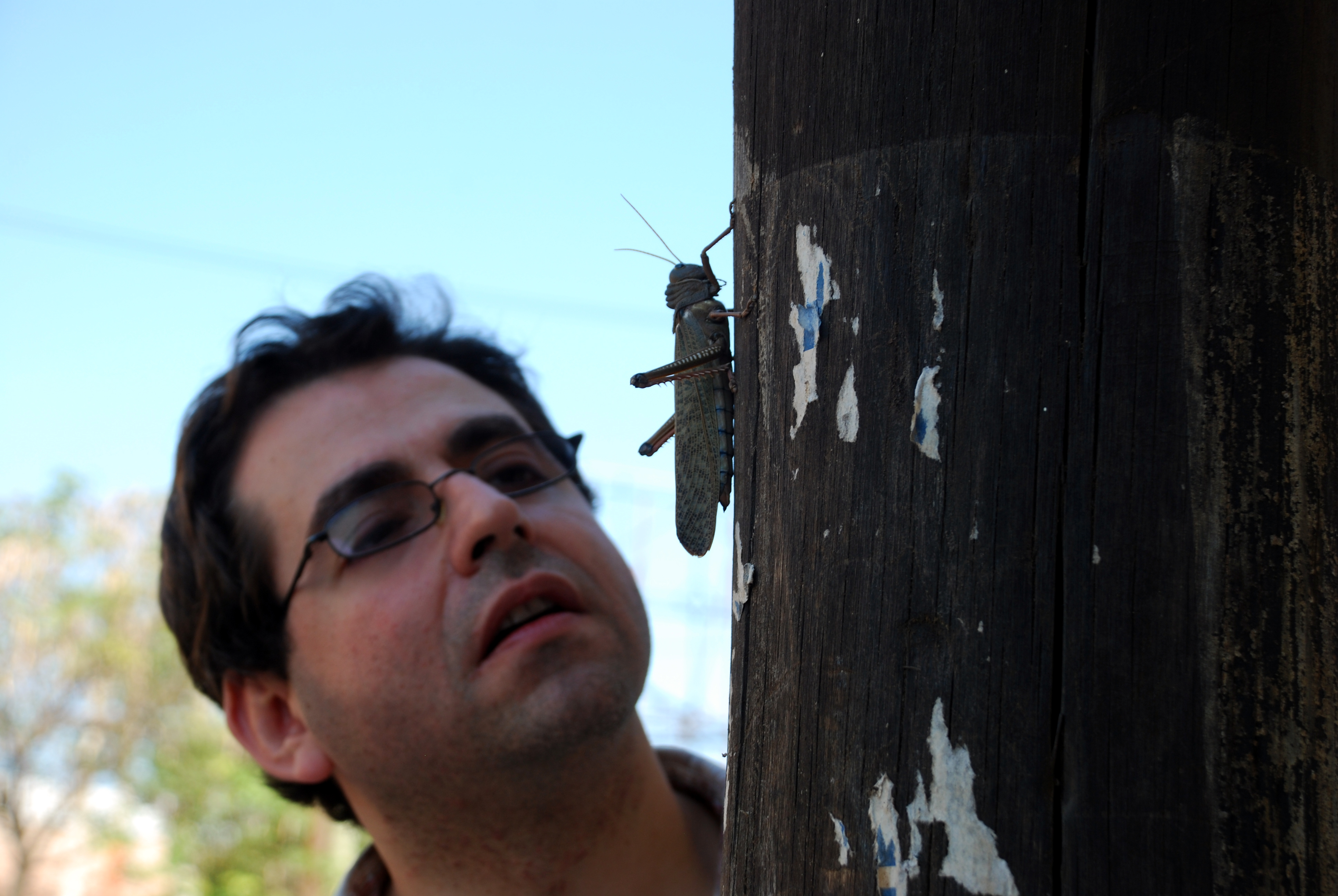 El poeta argentino Carlos J. Aldazábal